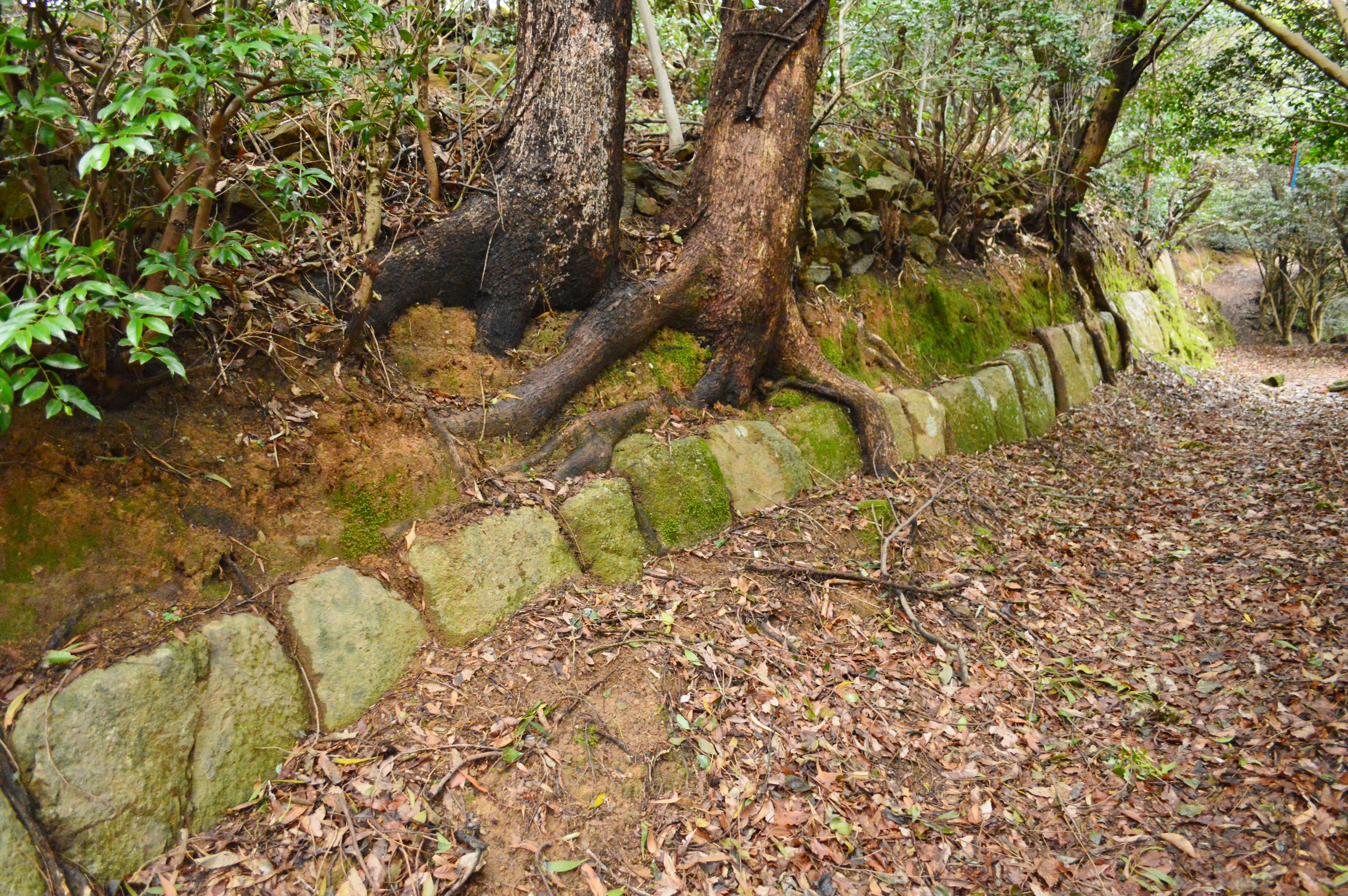 女山神籠石 列石遺構